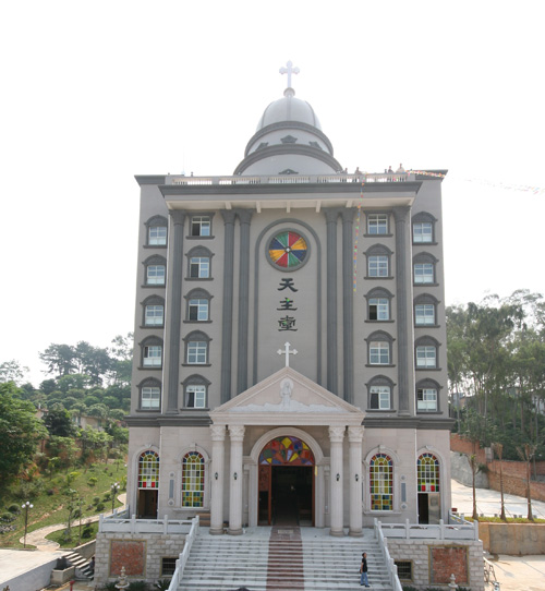 南宁总主教座堂